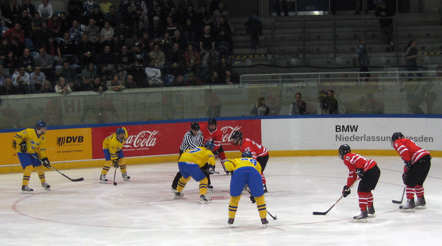 IIHF U18 WC 2011, Group B, Sweden vs. Canada 4:2, EnergieVerbund Arena, Dresden